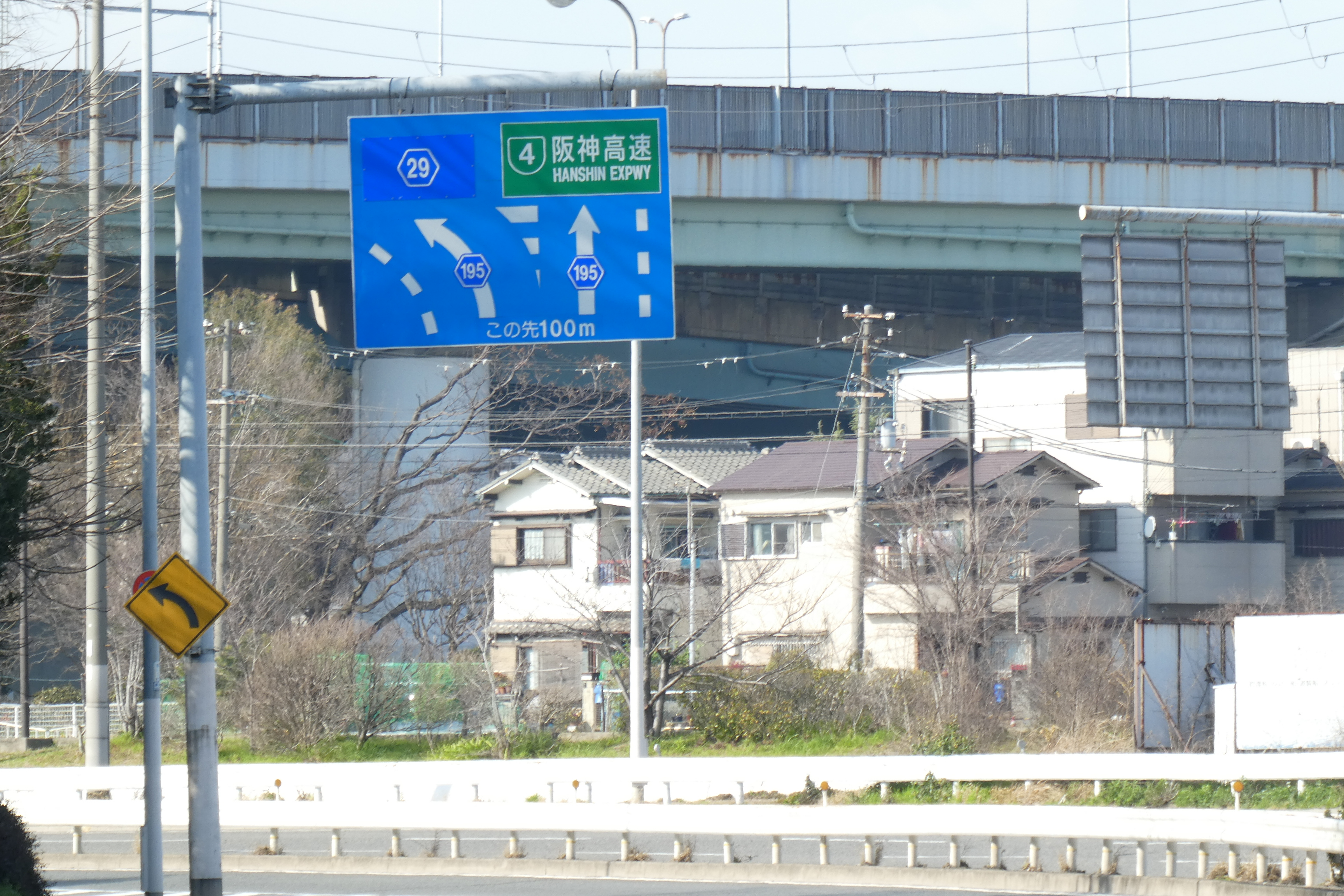 大阪府道195号堺港線。阪神高速4号湾岸線大浜出入口への分岐案内標識。